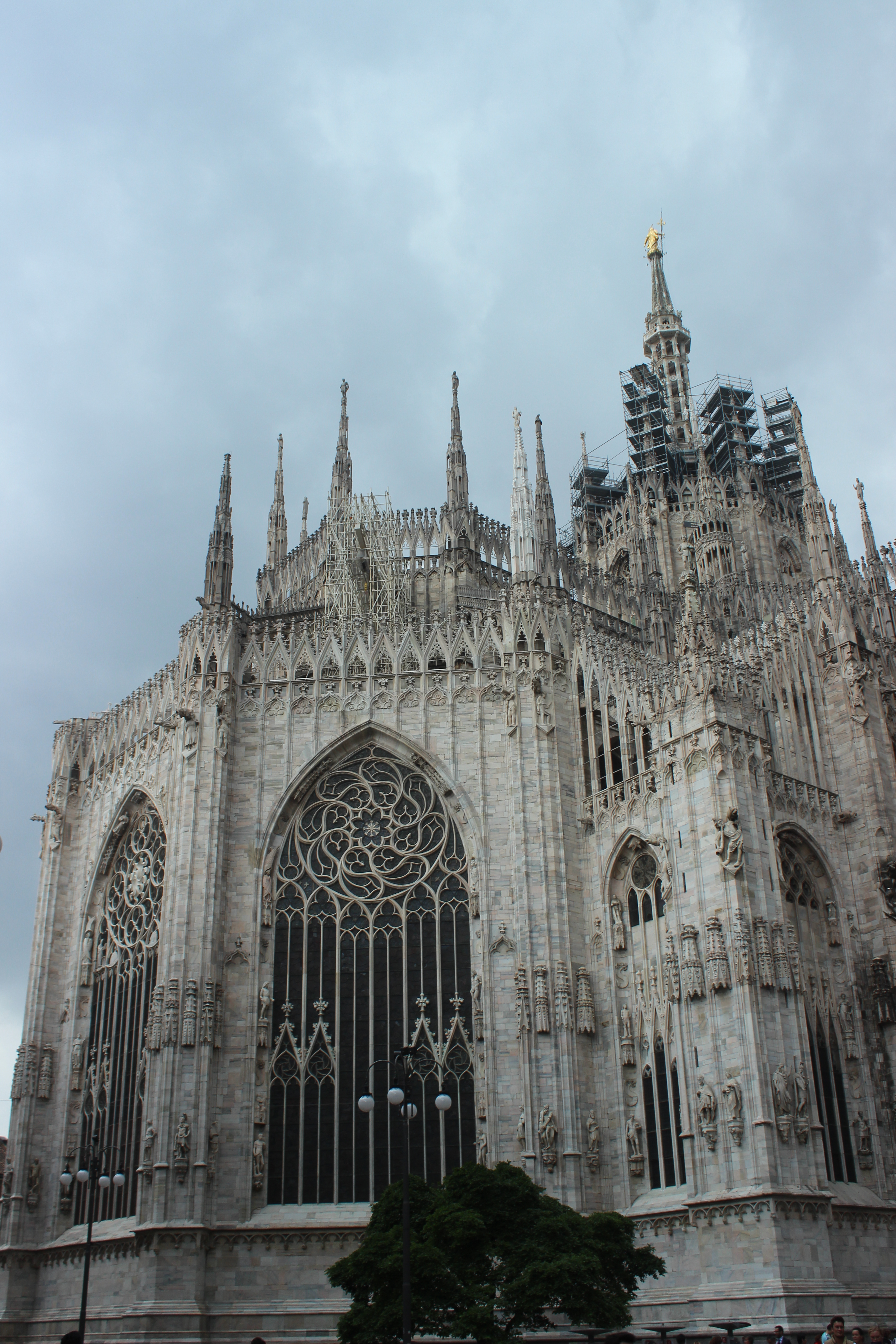 Milán, Duomo, ábside.